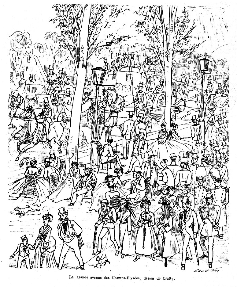 La grande avenue des Champs Élysées